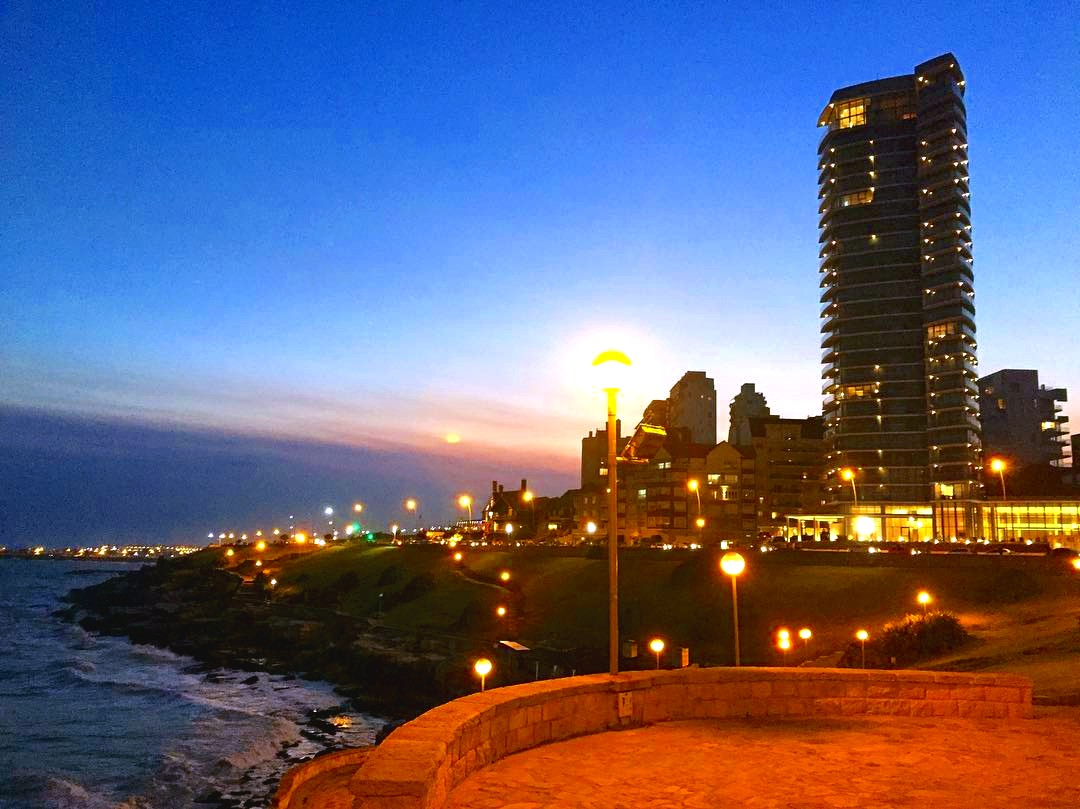 Bahia Playa Chica, Mar del Plata, mirando al sur. La primera de las tres torres 'Maral Explanada' (Arq. César Pelli, 2013 en adelante) se aprecia a la derecha.